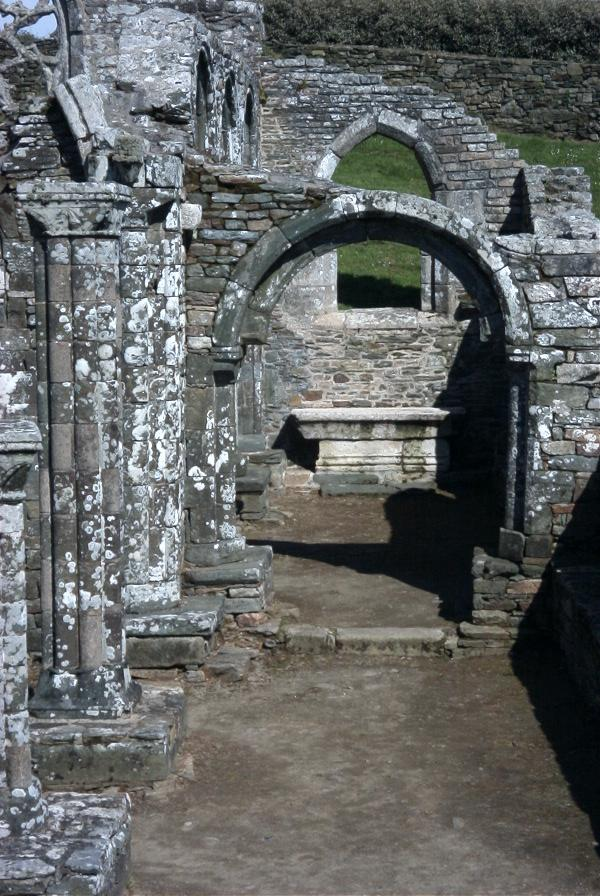 Chapelle de Languidou : arc transverse du collatéral sud